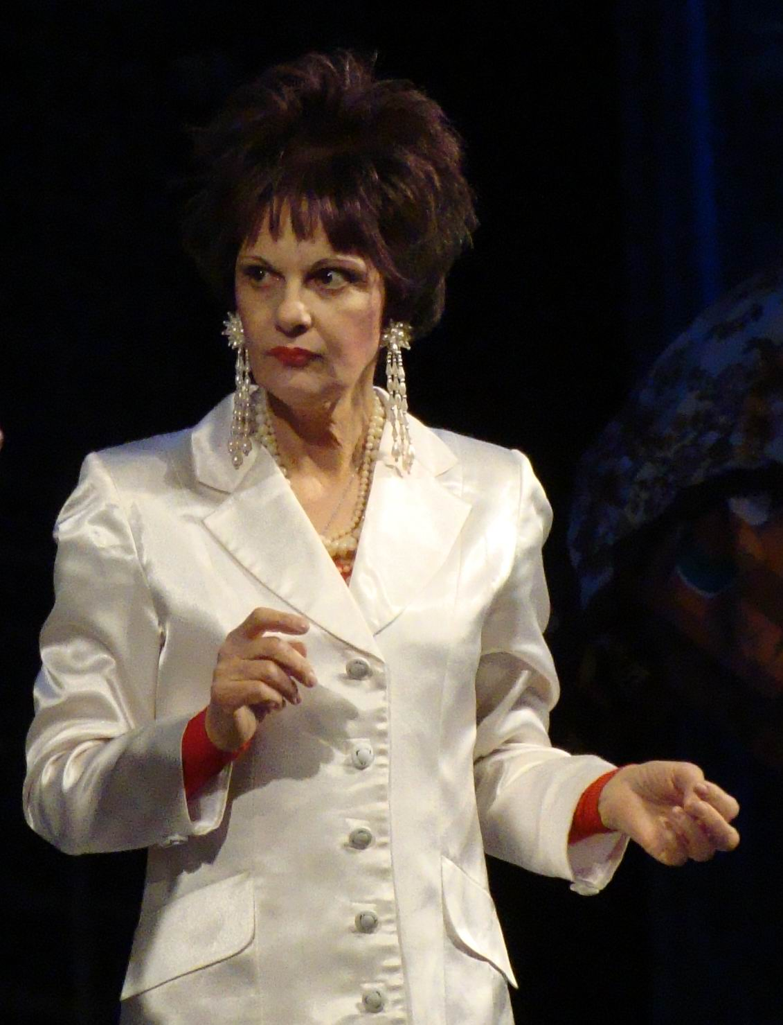 Тома Светлана Андреевна в лирической комедии Наталии Демчик "Заложники любви". Режиссёр-постановщик Геннадий Шапошников, Продюсер Александр Постников. Спектакль состоялся 23 ноября 2009 года в Драмтеатре города Северодвинска. Организатор гастролей - Сокольцева Алла Ивановна.